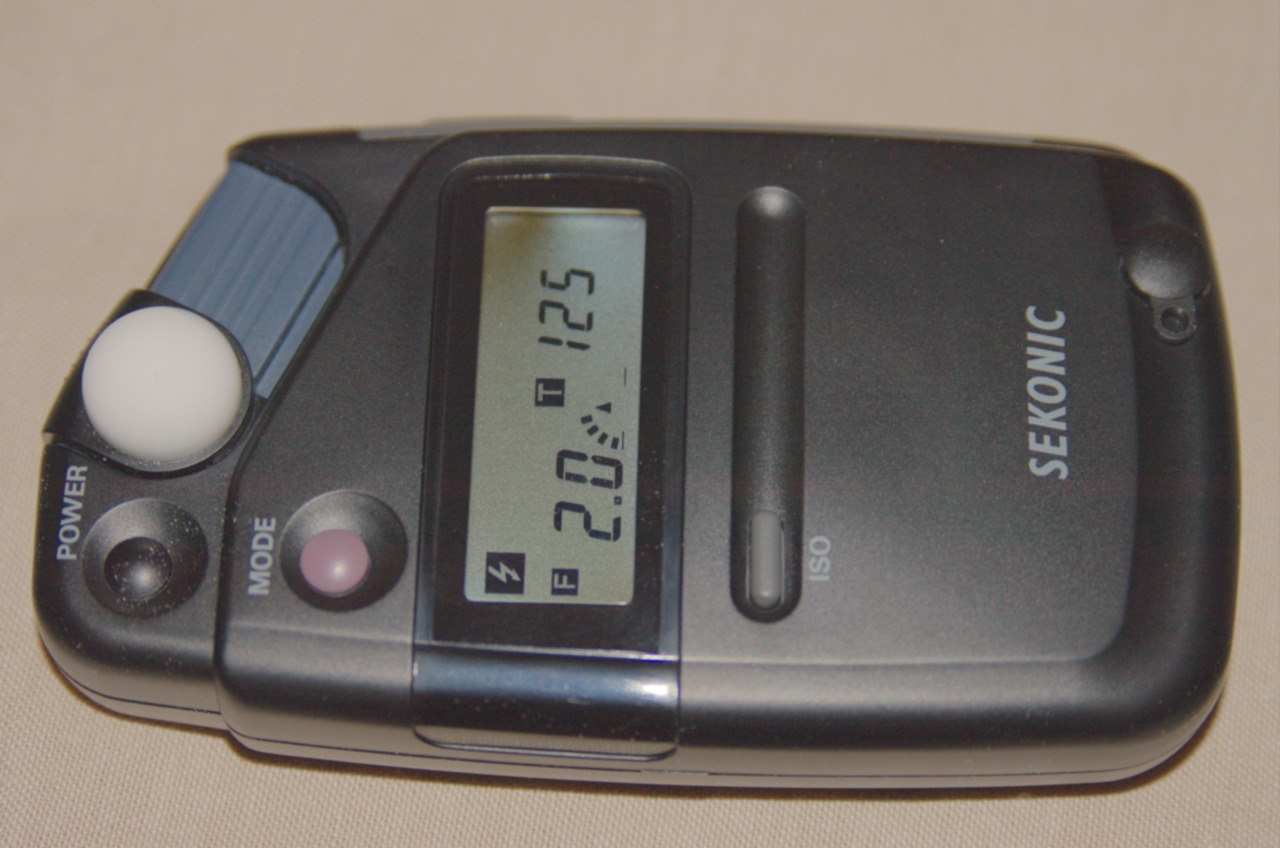 Un posemètre à main « moderne ».